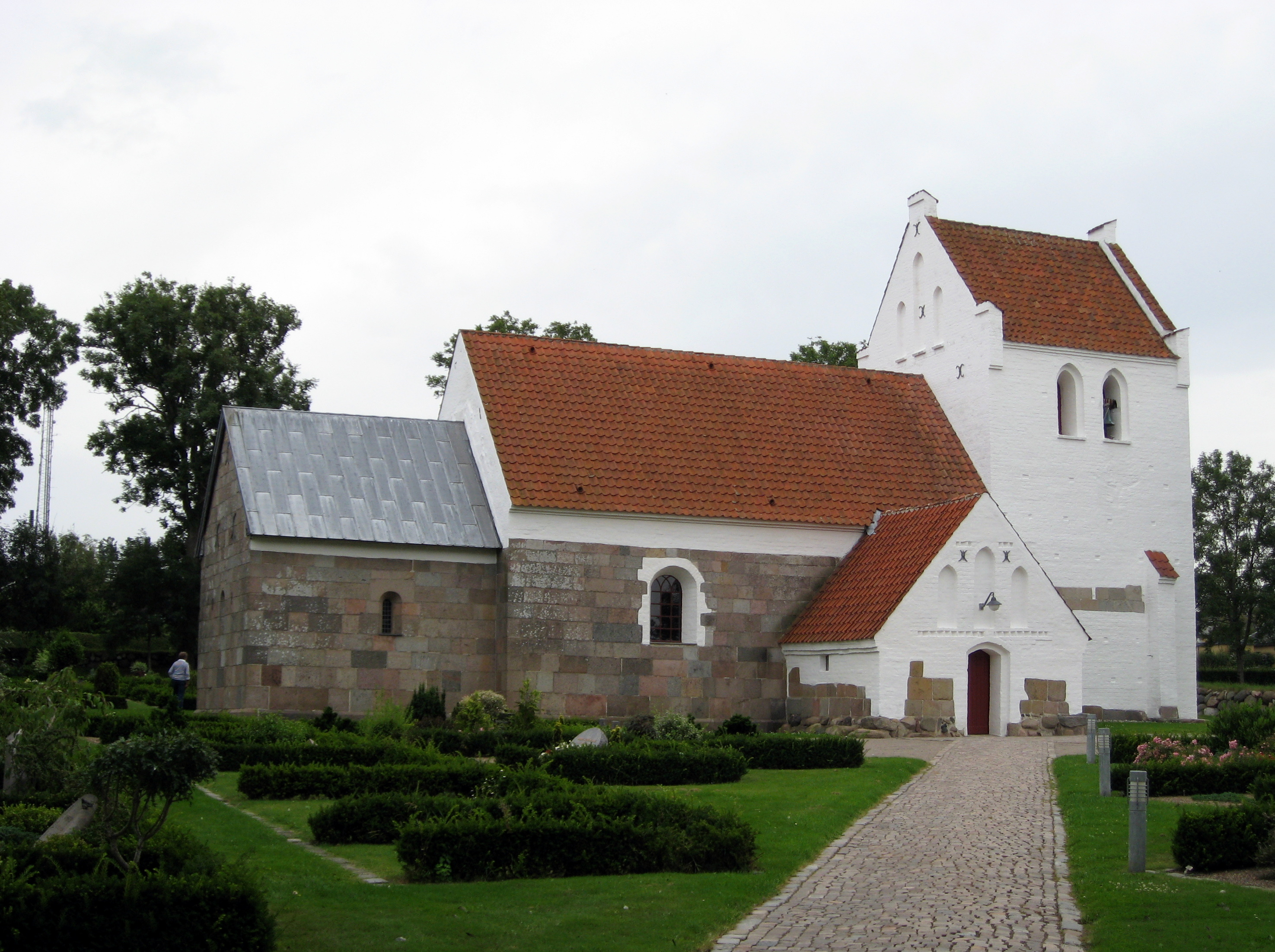 Klarup Kirke, Aalborg Kommune